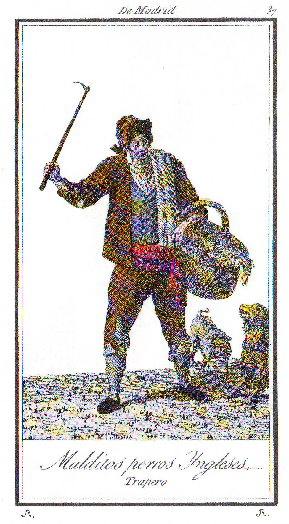 Grabado “Malditos perros Yngleses... Trapero.” (1802) en el catálogo de 'Trajes de España', dibujado por Antonio Rodríguez. Reproducción facsimil de treinta y ocho estampas, más catorce variantes, de los Trajes de Madrid. Todas iluminadas. Introducción de Juan Carrete Parrondo, Madrid (1989).